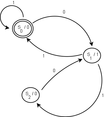 Example for a Moore-Automaton